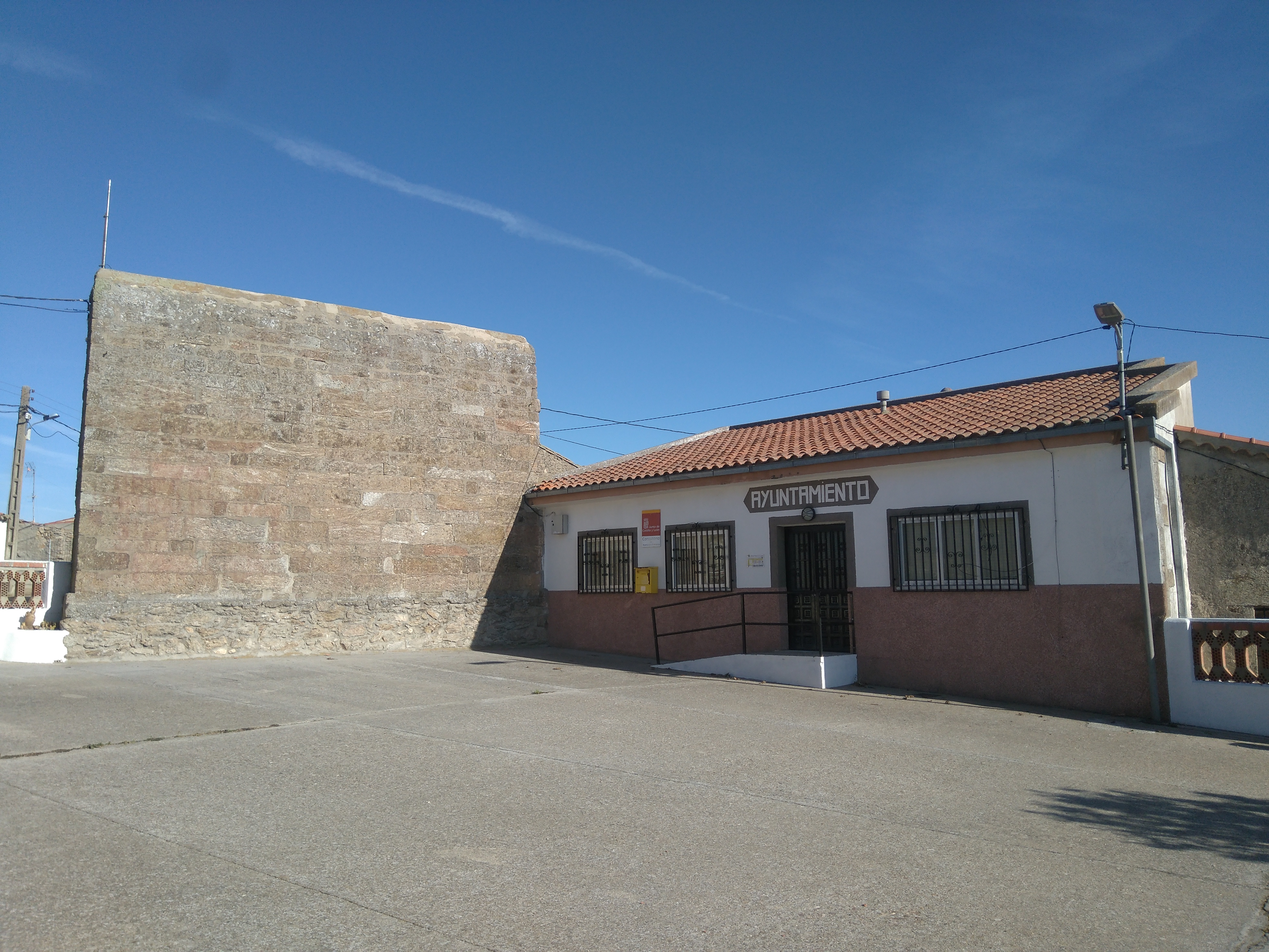 Ayuntamiento y antiguo frontón de Añover de Tormes